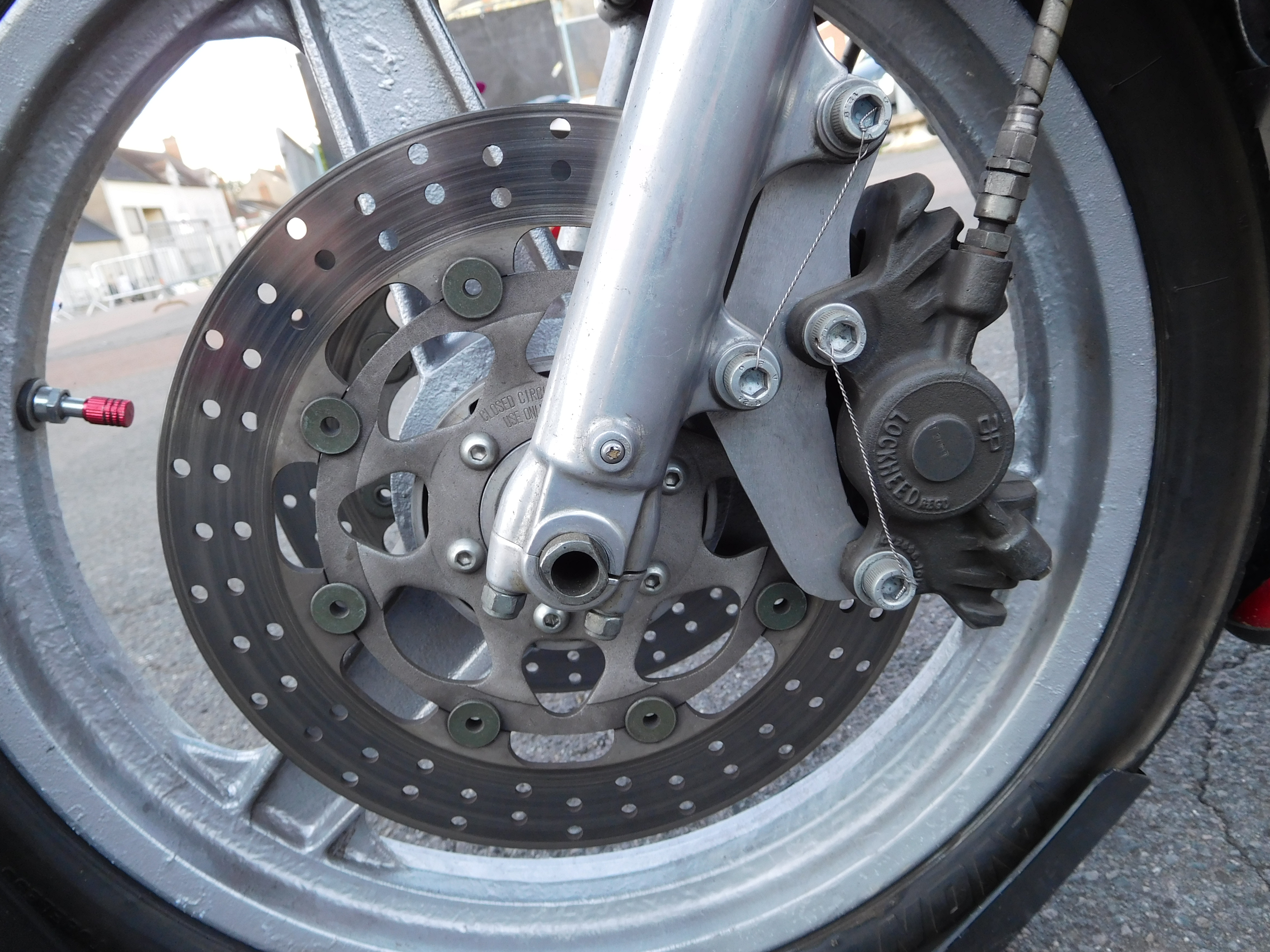 Roue avant d'une Yamaha TZ ?, Briare, Loiret, France.